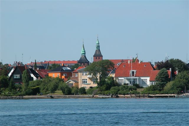 Svendborgsundbroen